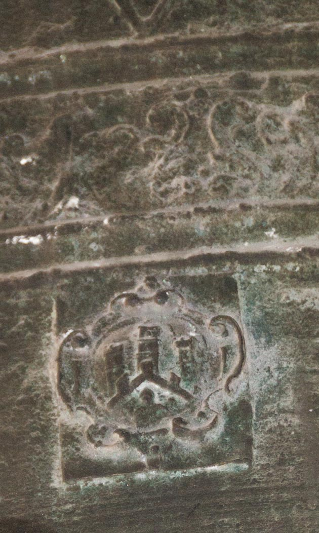 Stadtwappen Bad Neustadts auf der "Friedensglocke" in der Stadtpfarrkirche